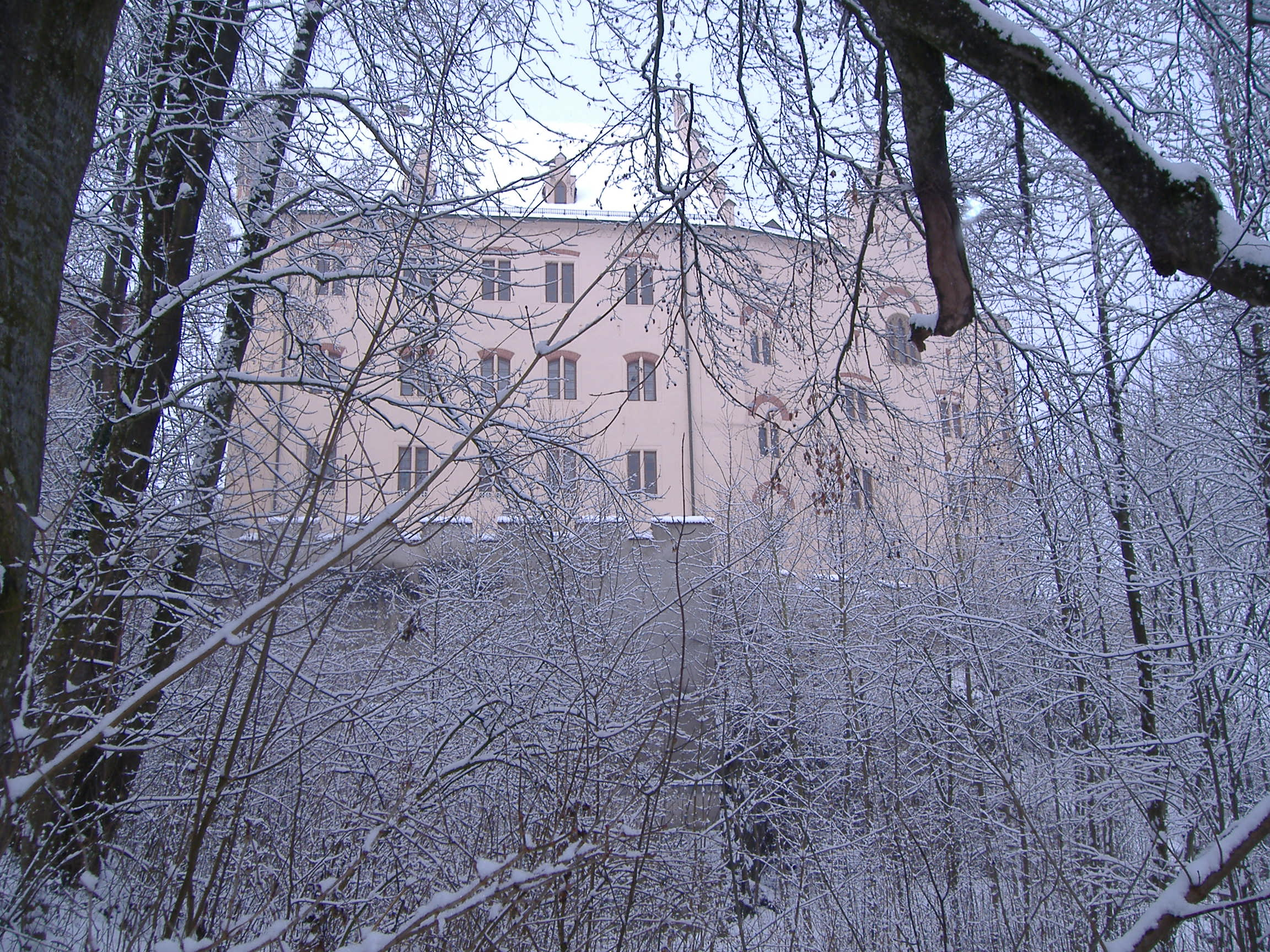 Schloss Haunsheim im Landkreis Dillingen an der Donau (Bayern)